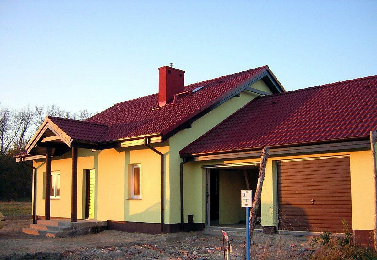 Nowo wybudowany dom w Nowym Borówku. Jak ustalę adres to przypiszę do ulicy.